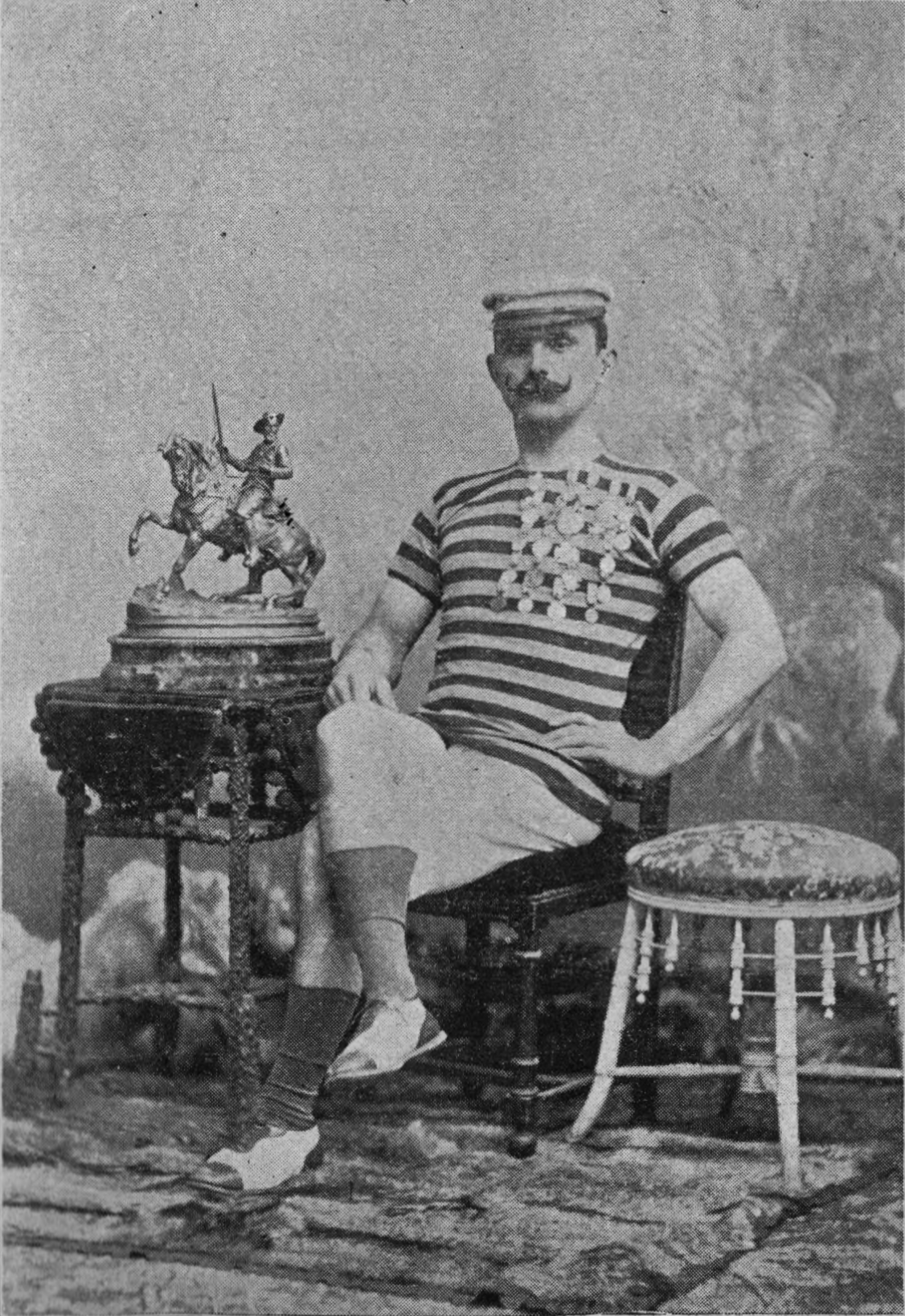 Fotografía del escribano y deportista uruguayo Carlos Sturzenegger.